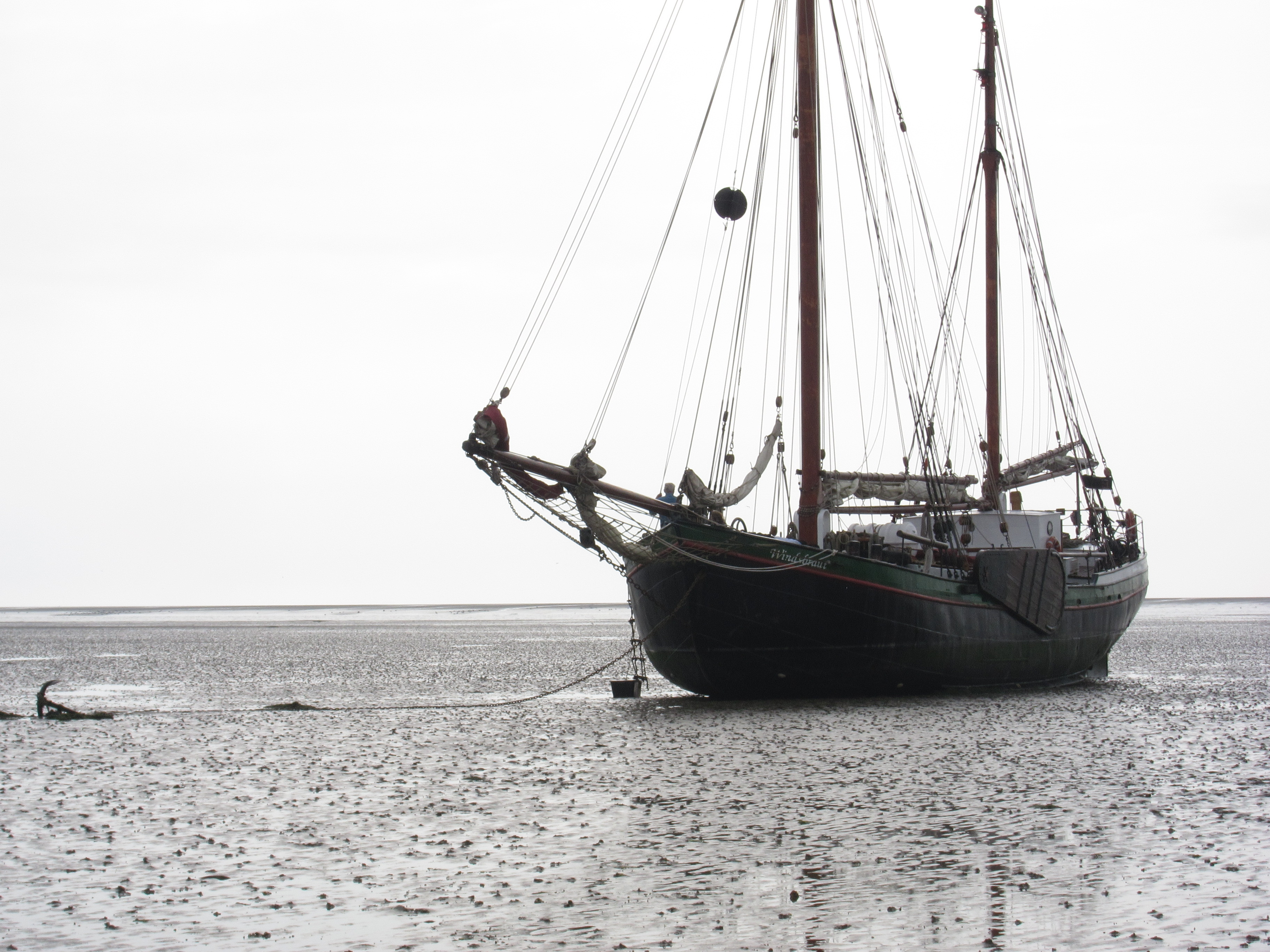 Windsbraut trockengefallen im nordfriesischen Watt